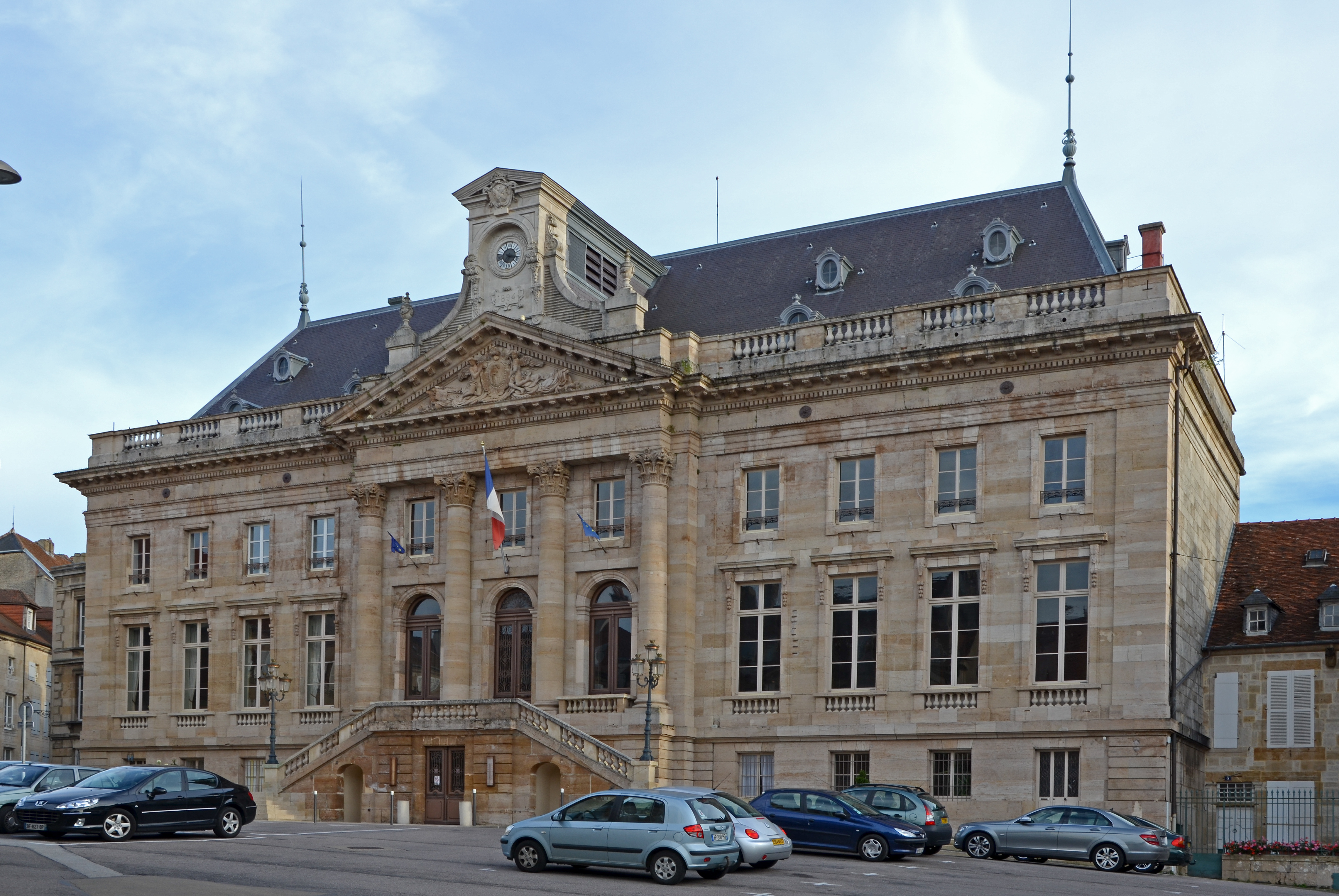 Hôtel de ville de Langres, Haute-Marne, Champagne-Ardennes, France